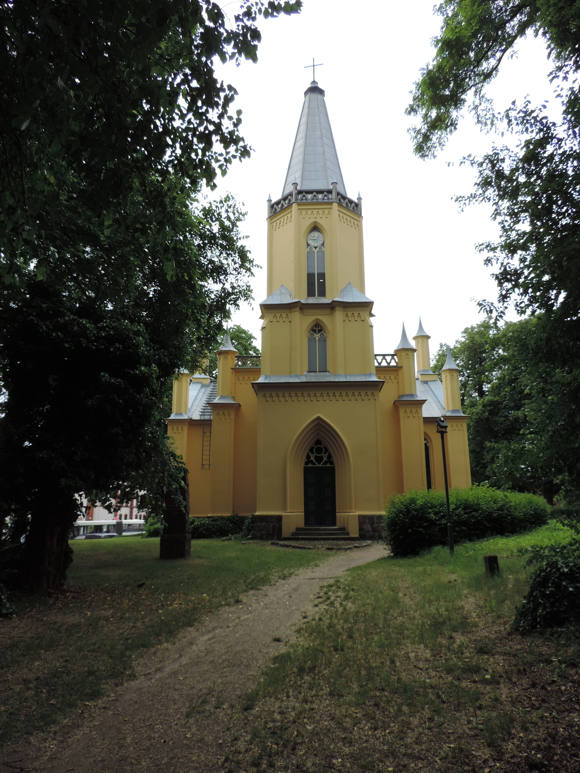 Kirche in Großbeeren von Karl Friedrich Schinkel